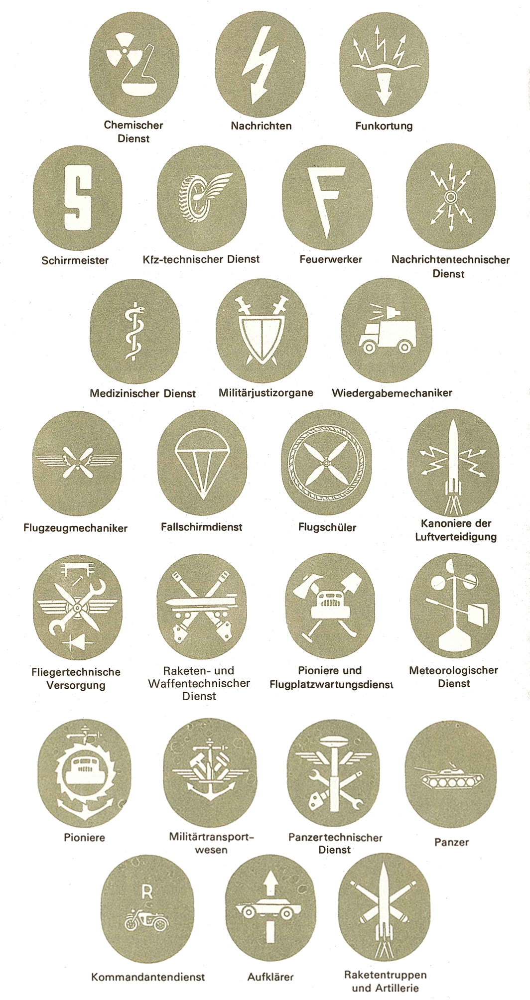 Dienstlaufbahnabzeichen der NVA